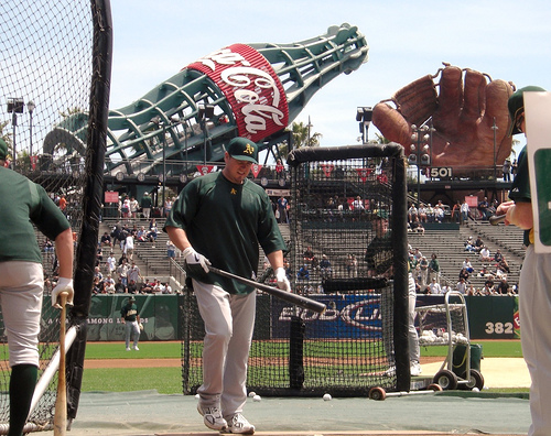 Jack Cust 19:58, 13 August 2007 . . Atrus79 . . 500×396 (157 KB)